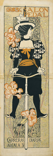 Cartel publicitario realizado por Alexander de Riquer en 1897.